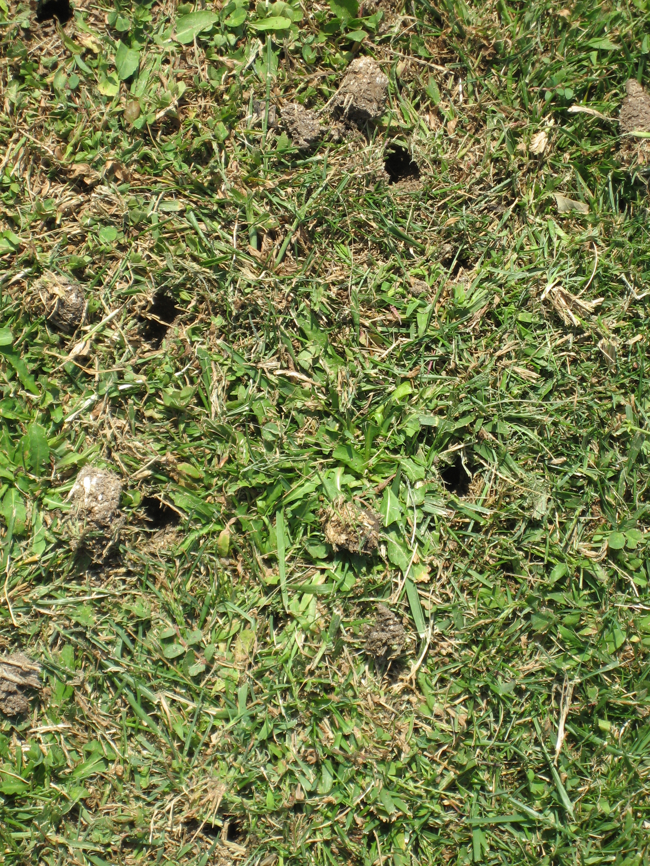 Suelo con perforaciones y bocados extraidos. Aireadora con motor térmico, Ryan Lawnaire IV.